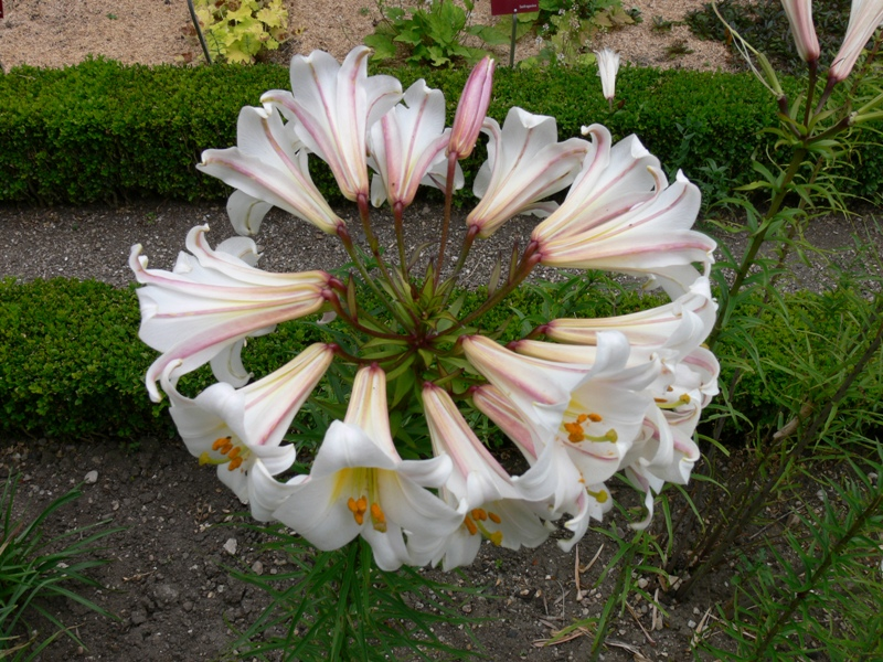 couronne de Lys Royaux, au Jardin Godron de Nancy, Lorraine, France